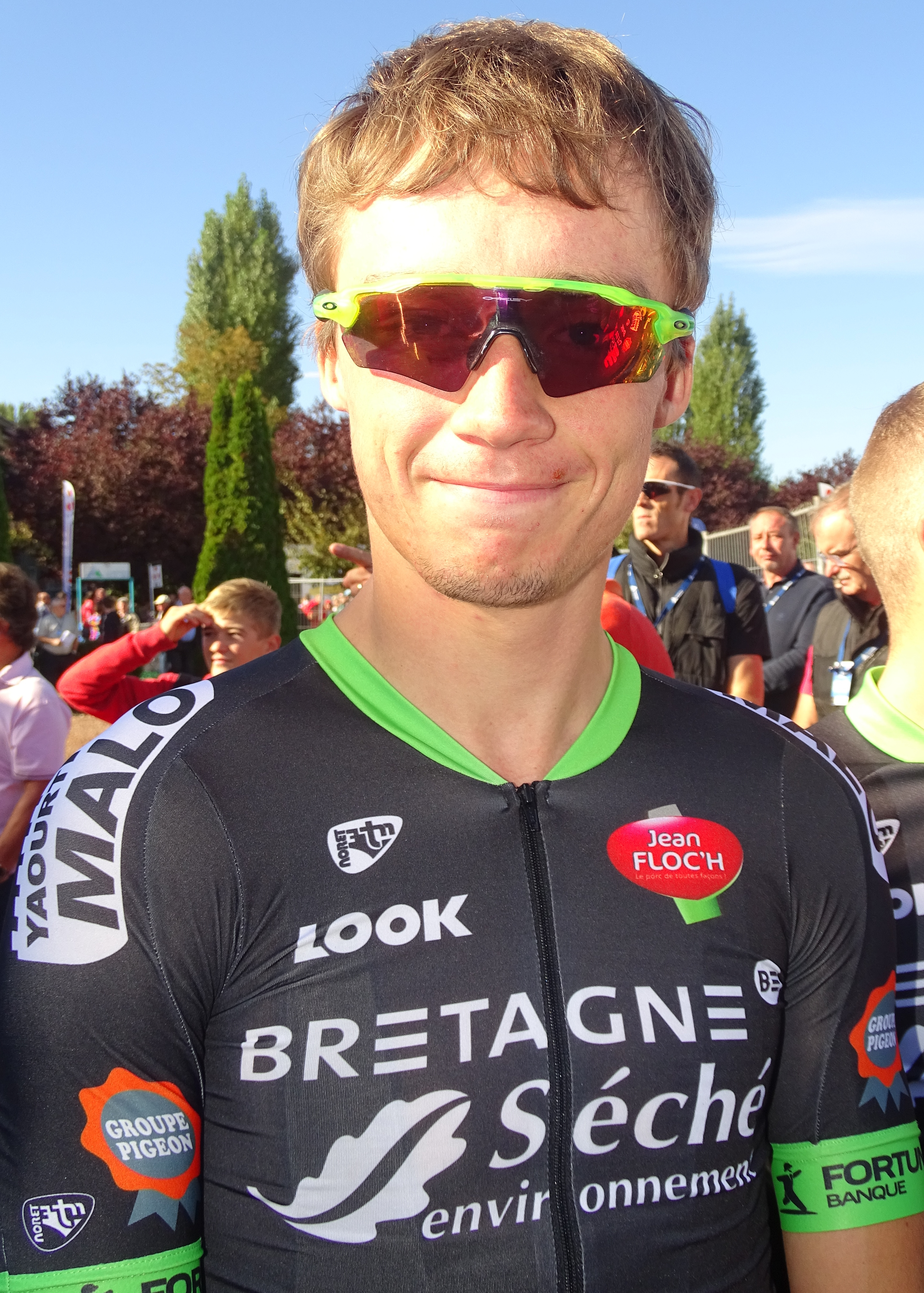 Reportage réalisé le dimanche 20 septembre à l'occasion du départ et de l'arrivée du Grand Prix d'Isbergues 2015 à Isbergues, Nord-Pas-de-Calais, France.